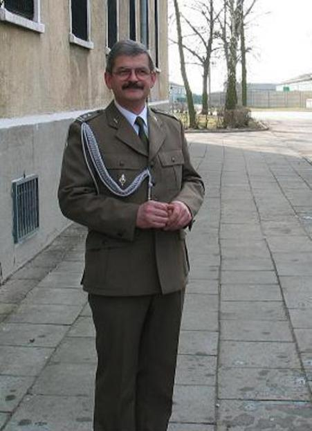 Dowódca 12 bm ppłk lek. Adam Kufka